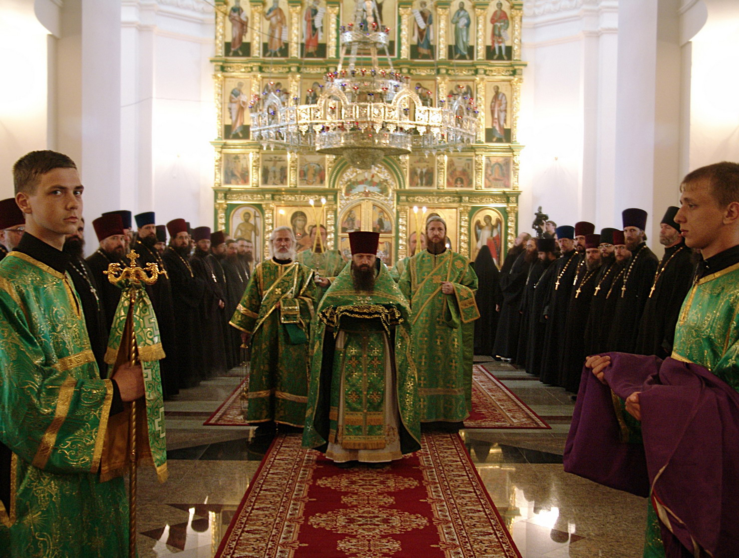 Богослужение в храме праведного Симеона Верхотурского. Меркушино. 11 августа 2004 года